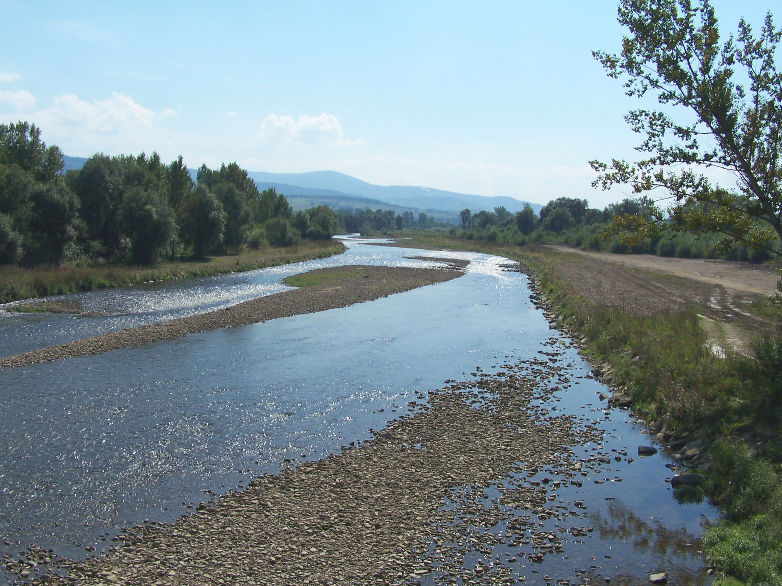 Soła River near Wieprz, Poland